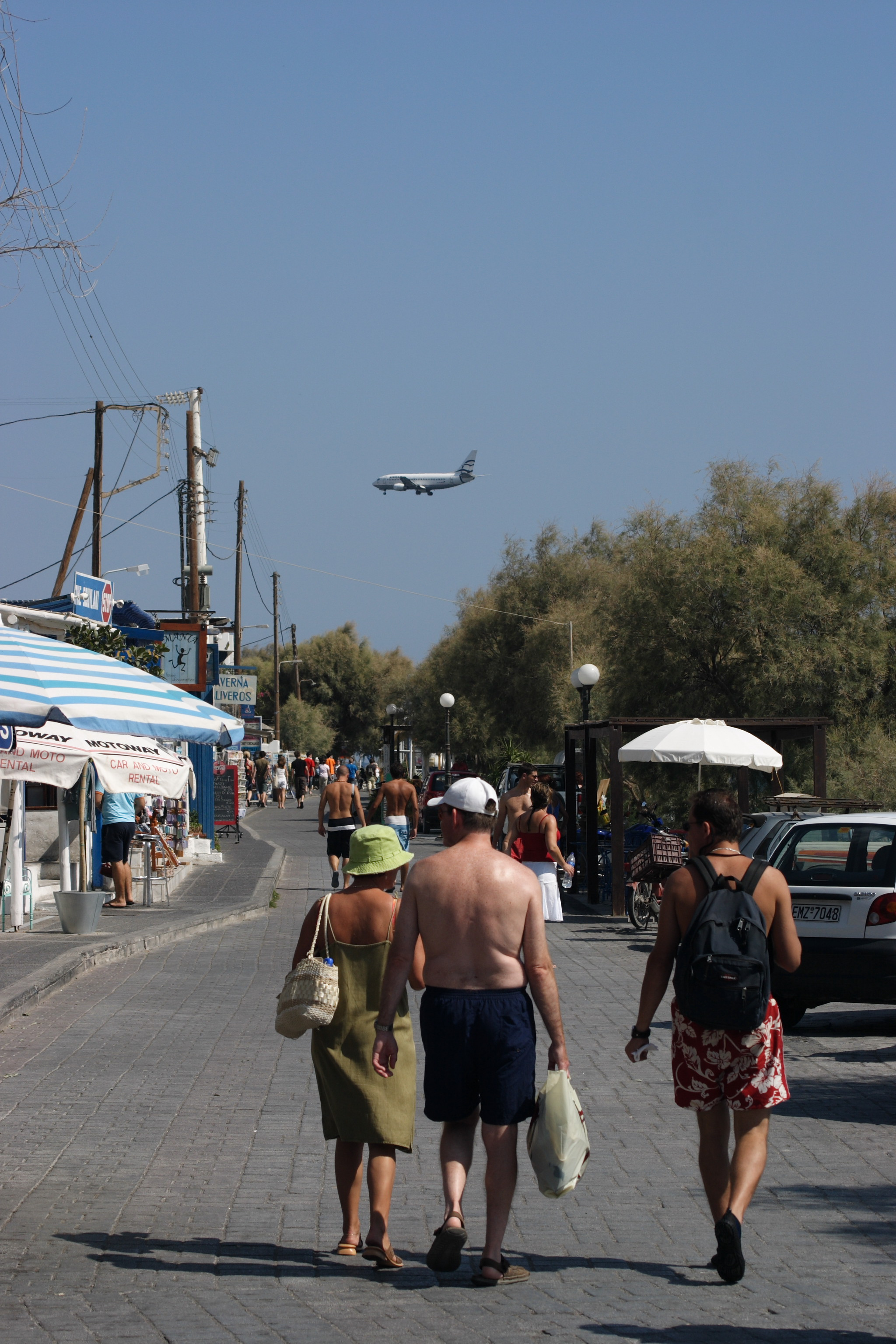 Alameda of Kamari